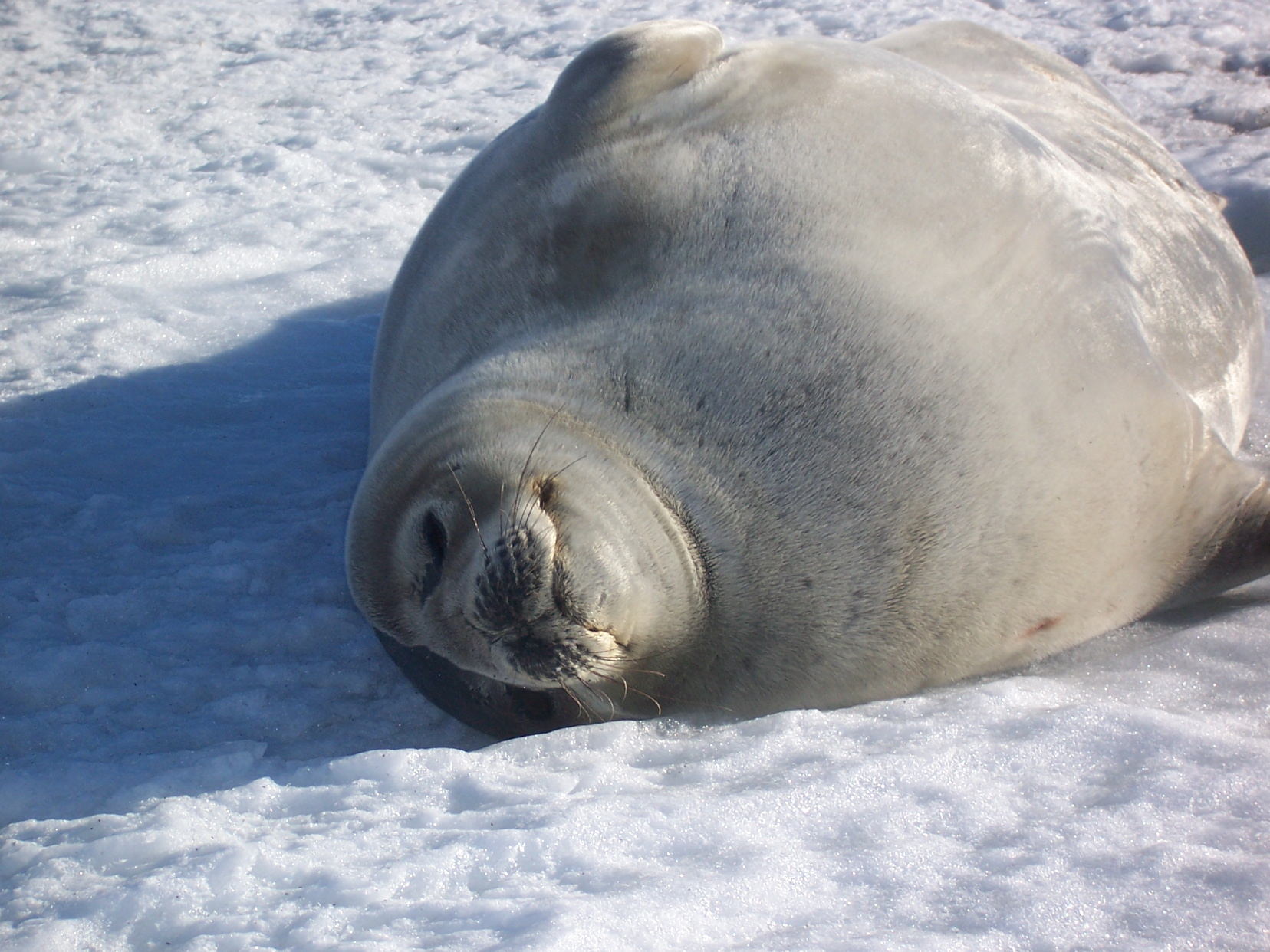 Phoque de Weddell. Photo prise à coté de la base Française Dumont d'Urville en Antarctique.